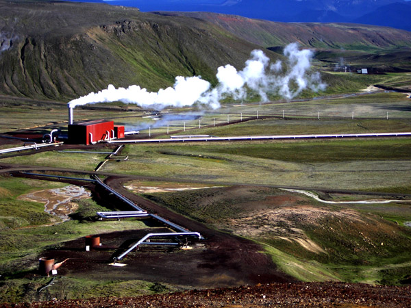 KröflustöÐ, central geotérmica junto al volcán Krafla, Islandia